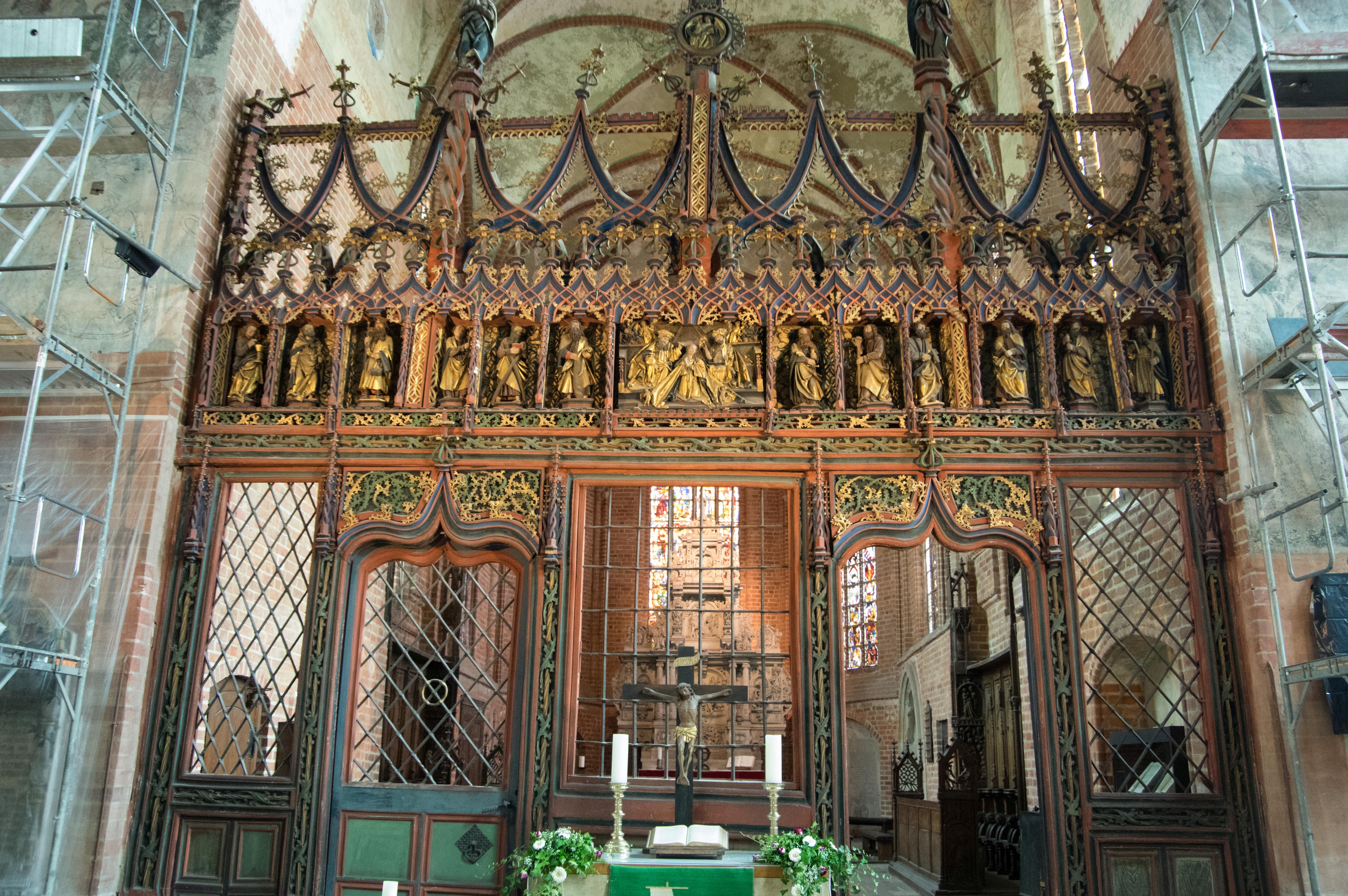 Stendal in Sachsen-Anhalt. Die Jacobikirche steht unter Denkmalschutz.